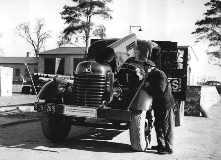 Königsborn, Wartung eines LKWs Zentralbild Rösener 25.3.1952.Frühjahrsaussaat 1952 in der Deutschen Demokratischen Republik. UBz: Auch dieser Lastwagen der MAS Königsborn muss besonders in der Zeit der Frühjahrs aussaat stets einsatzfähig sein. Fahrer Walter Becke sorgt für ihn; denn er ist bereits 100.000 km mit ihm ohne General reparatur gefahren.